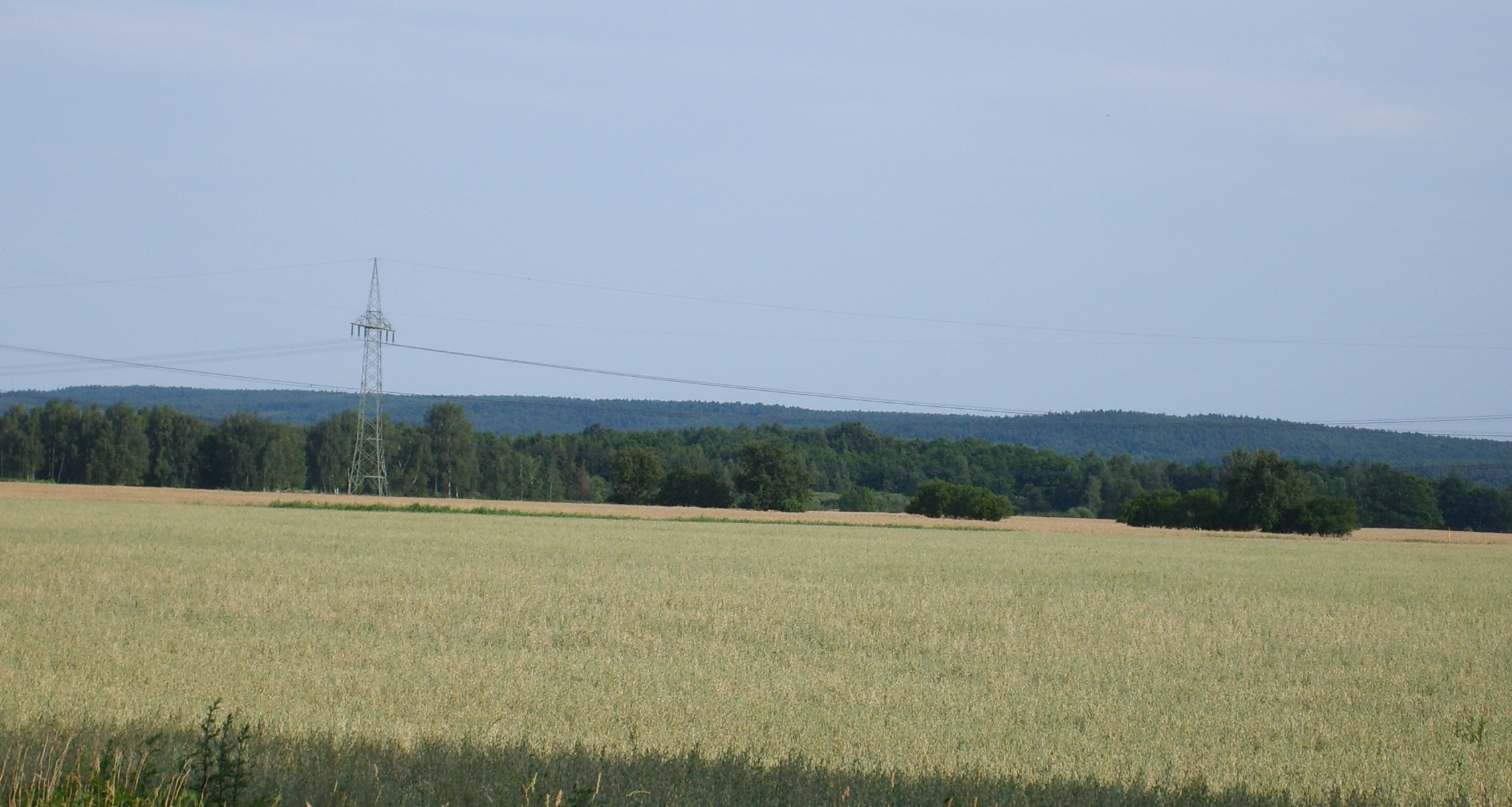 Heidehöhe, die höchste Erhebung im Bundesland Brandenburg von Norden gesehen.